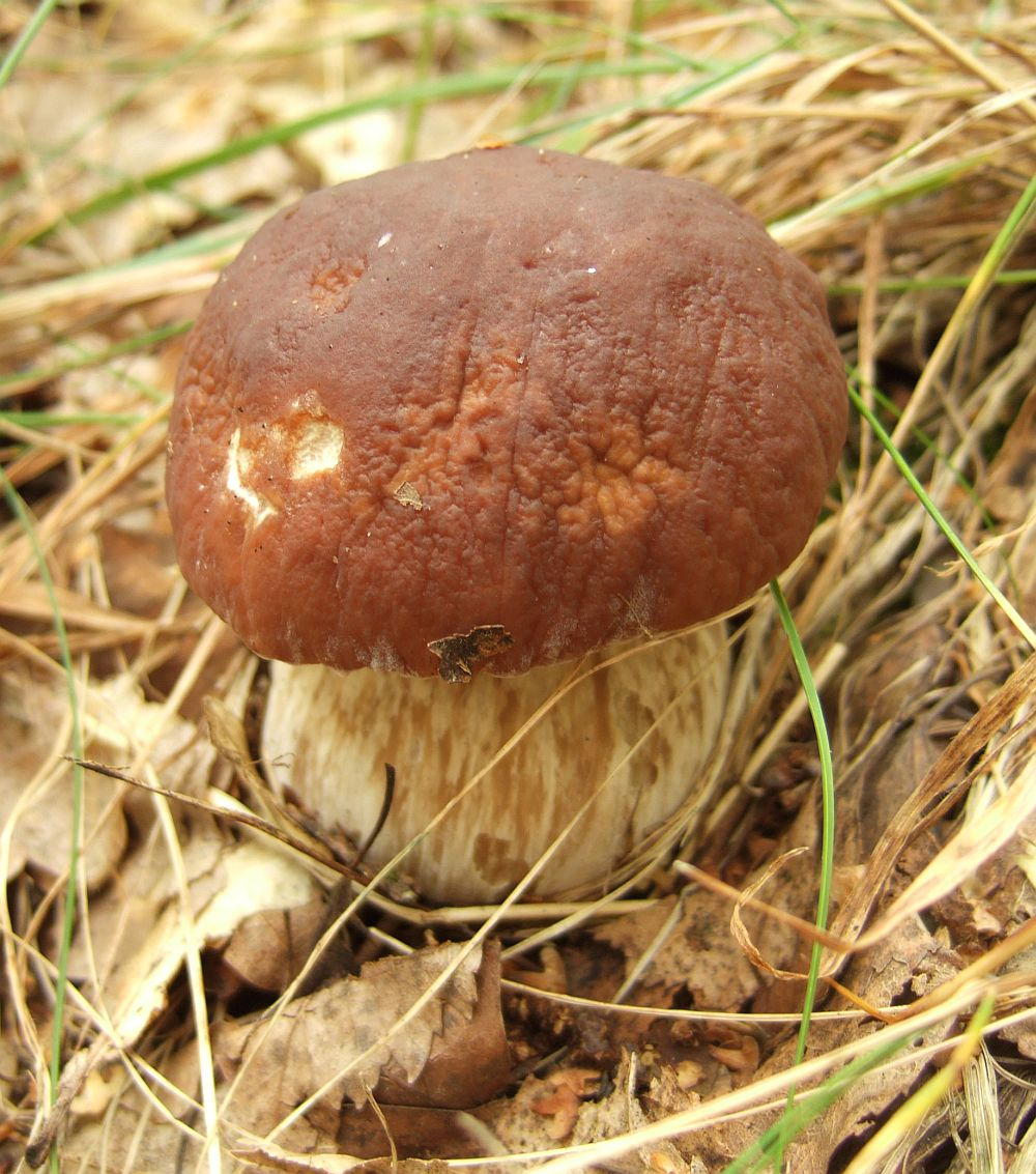 Tikrinis baravykas (Boletus edulis, angl. Porcini, vok. Steinpilz)